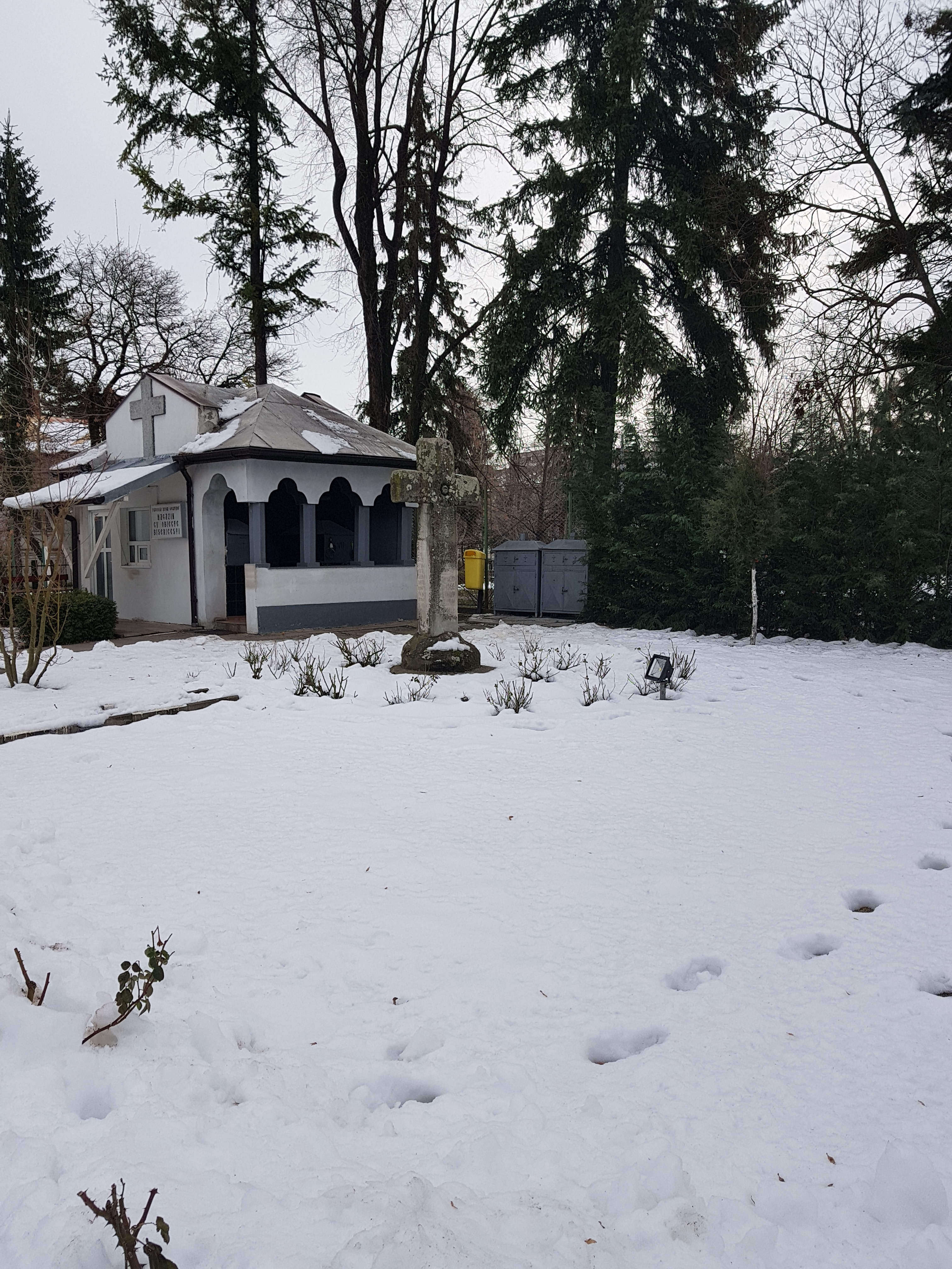 Crucea Mișeilor